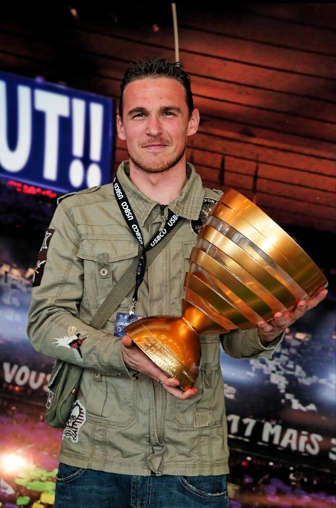 Richard Trivino joueur de football français pris en photo lors du salon galaxy foot